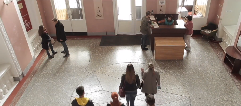 В МГПУ